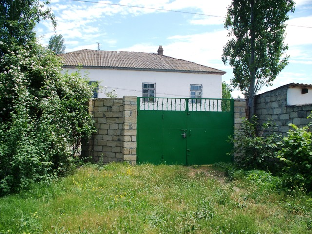 деревня Чархы (Азербайджан)